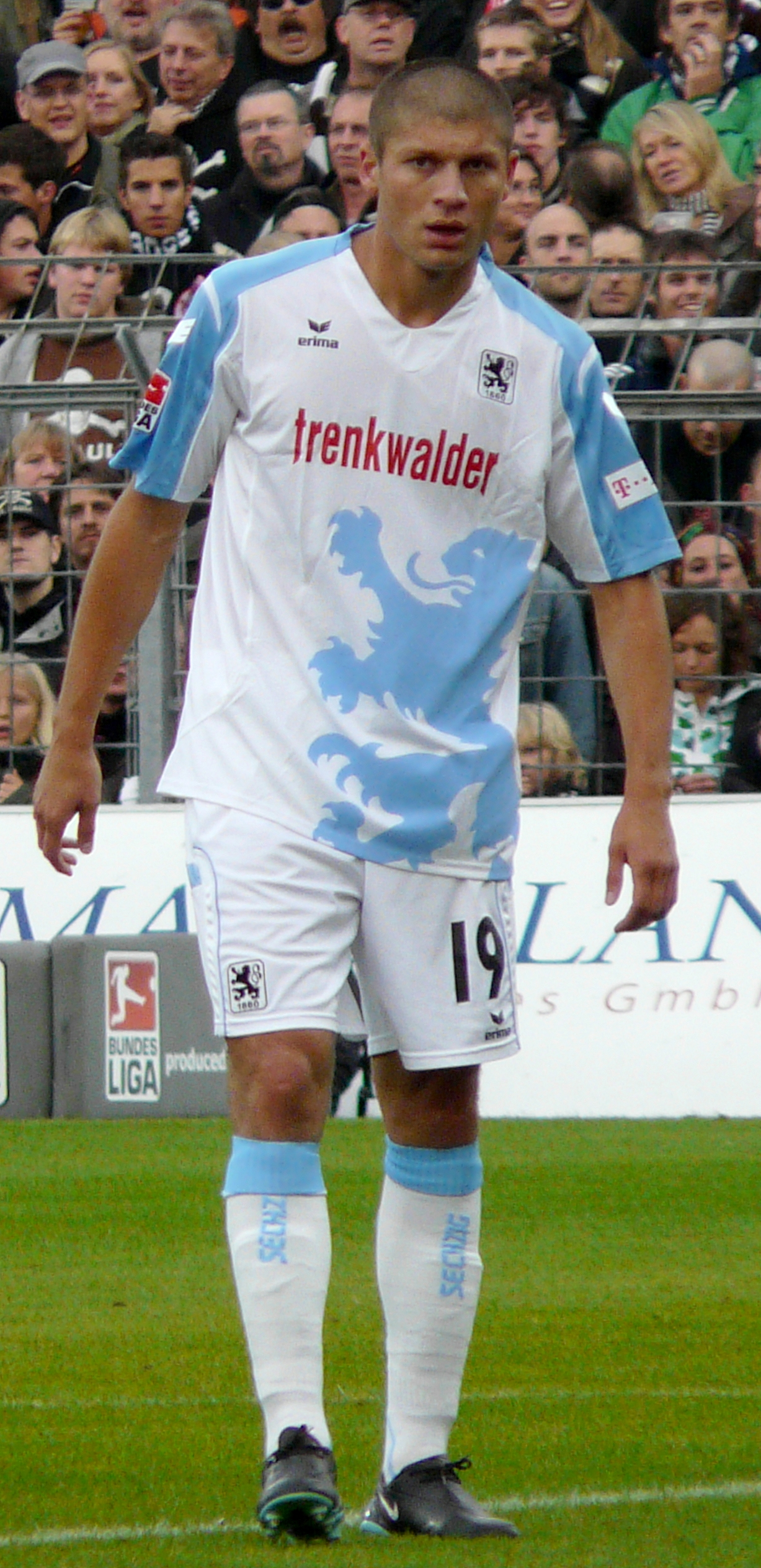 Mate Ghwiniandse